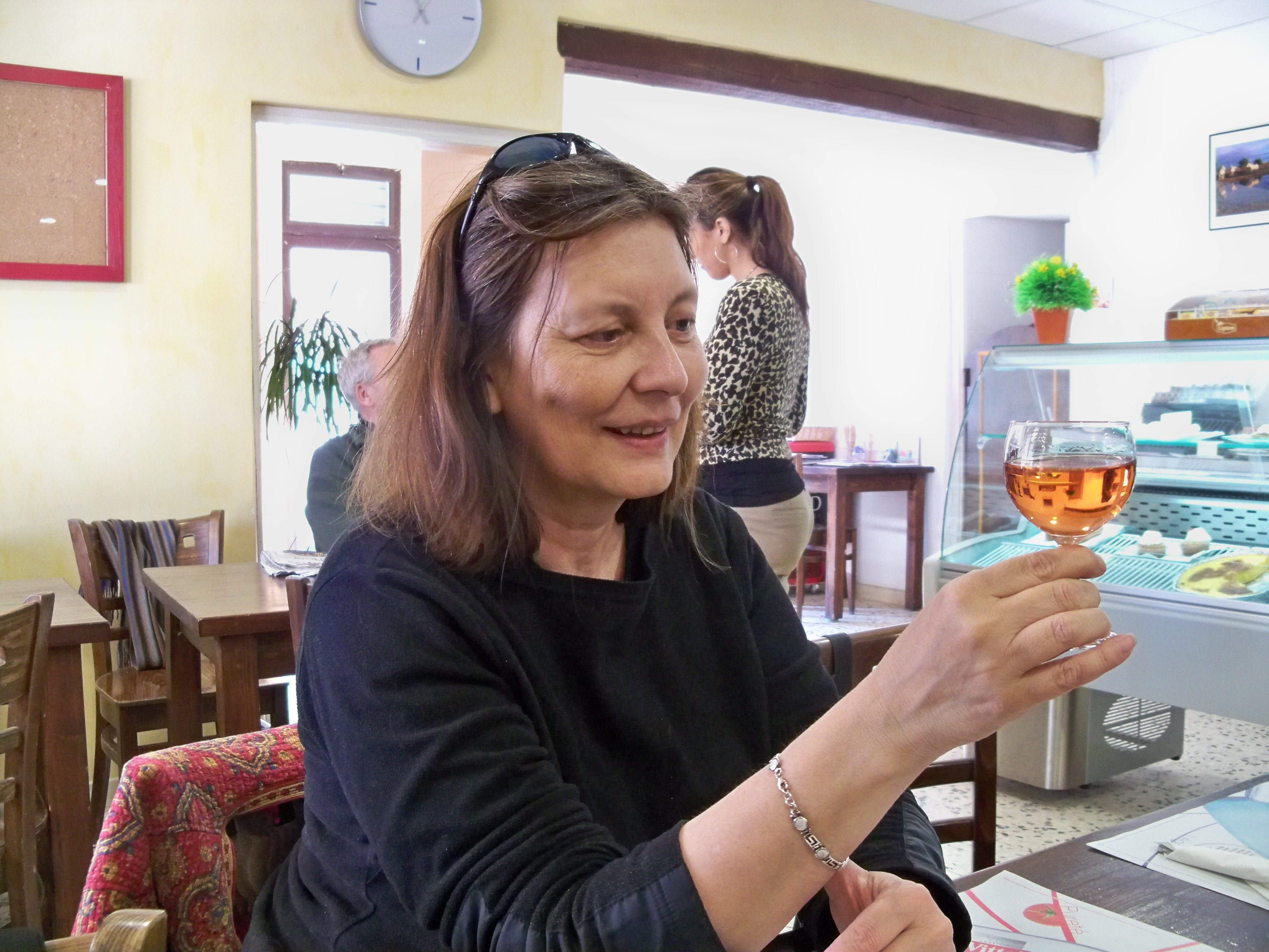 Degustation - Mirer